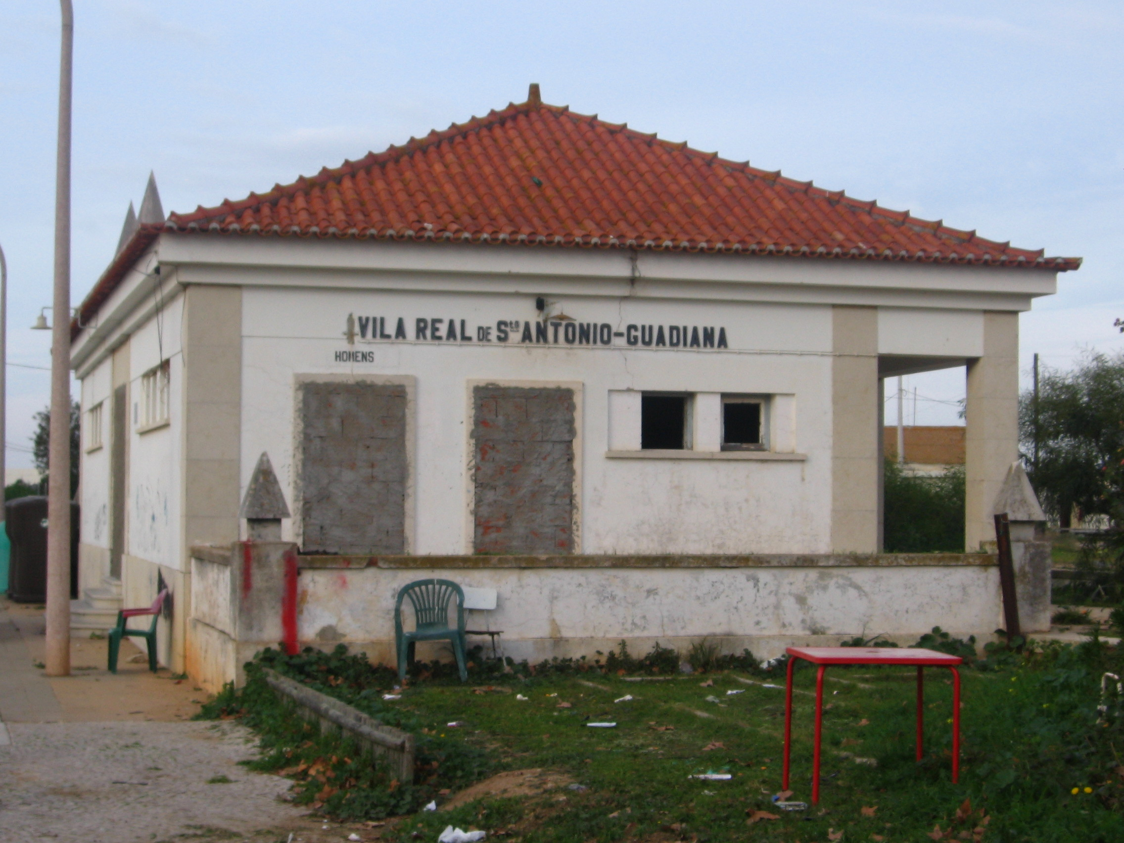 Estação ferroviária de Vila Real de Santo António-Guadiana (já desactivada), na Linha do Algarve.